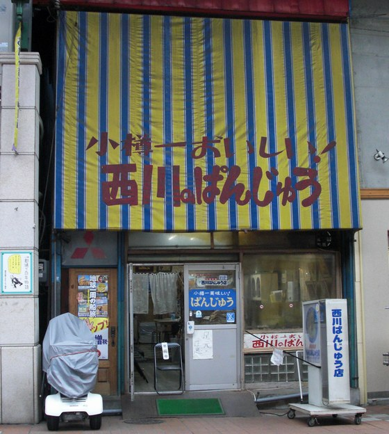 Nisikawa Panjū (wagashi shop, Otaru-shi, Japan)